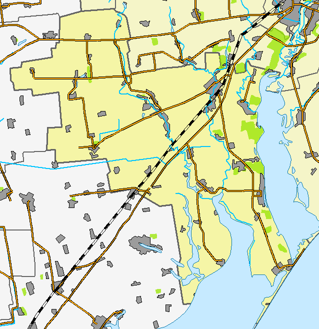 Акимовский район, Запорожская область, Украина